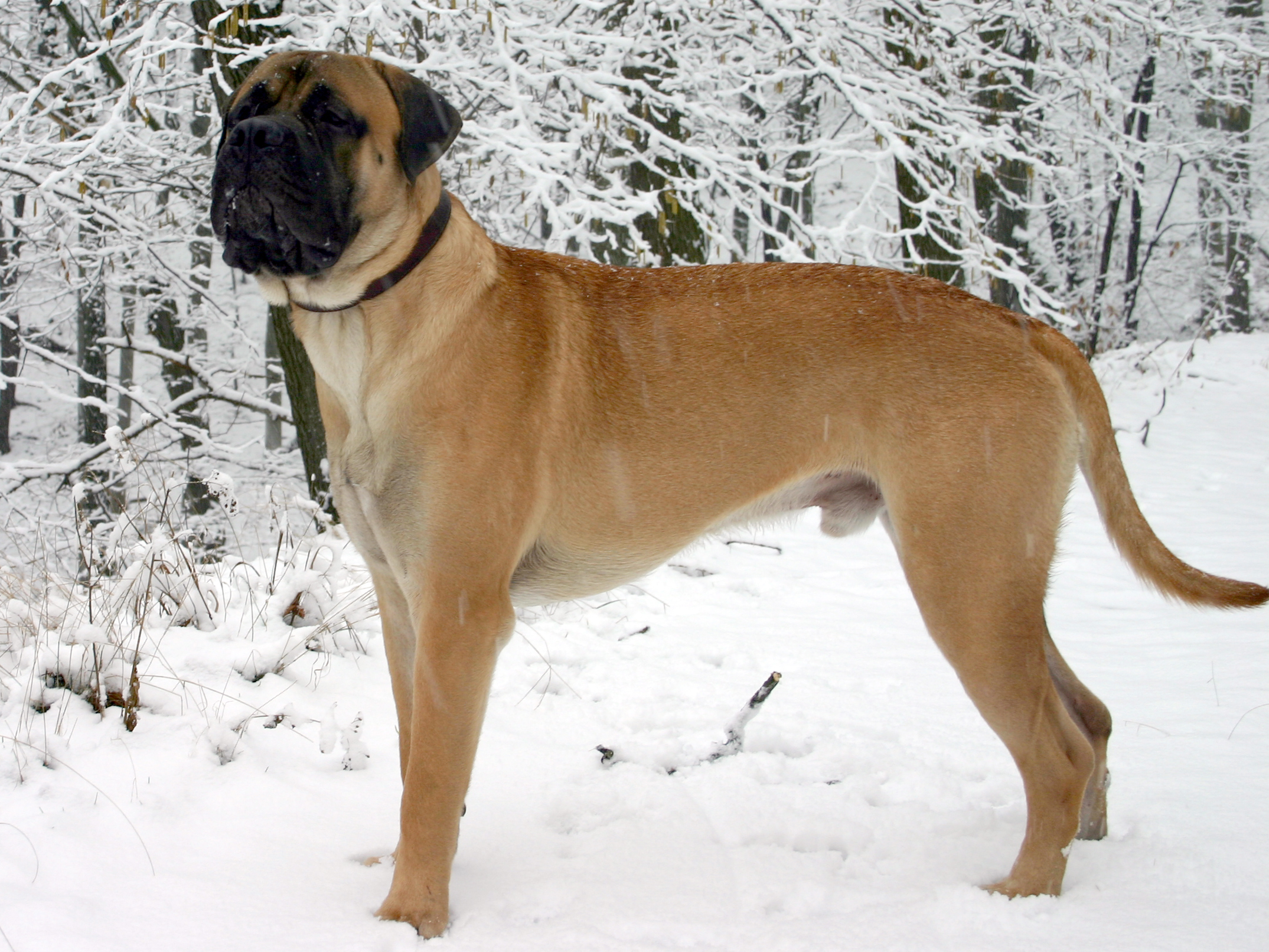 Bullmastiff-Rüde, ein Jahr alter Junghund